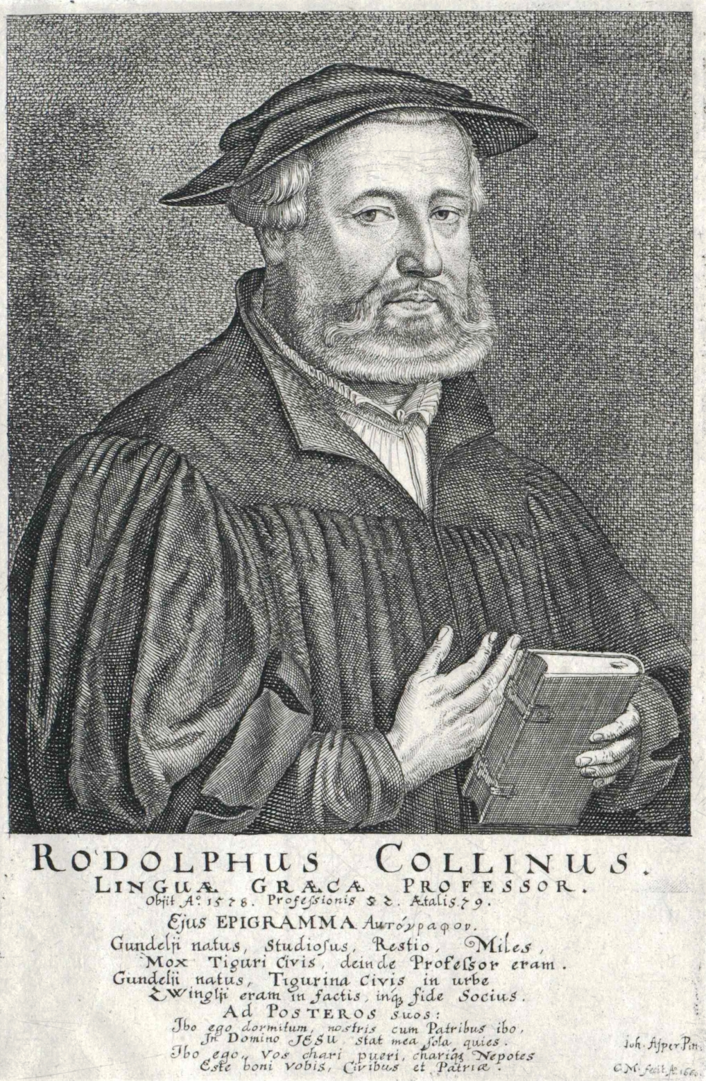 Rudolf Collinus (1499–1578), Stich aus dem Jahr 1660 von Conrad Meyer (1618-1689) nach Hans Asper.